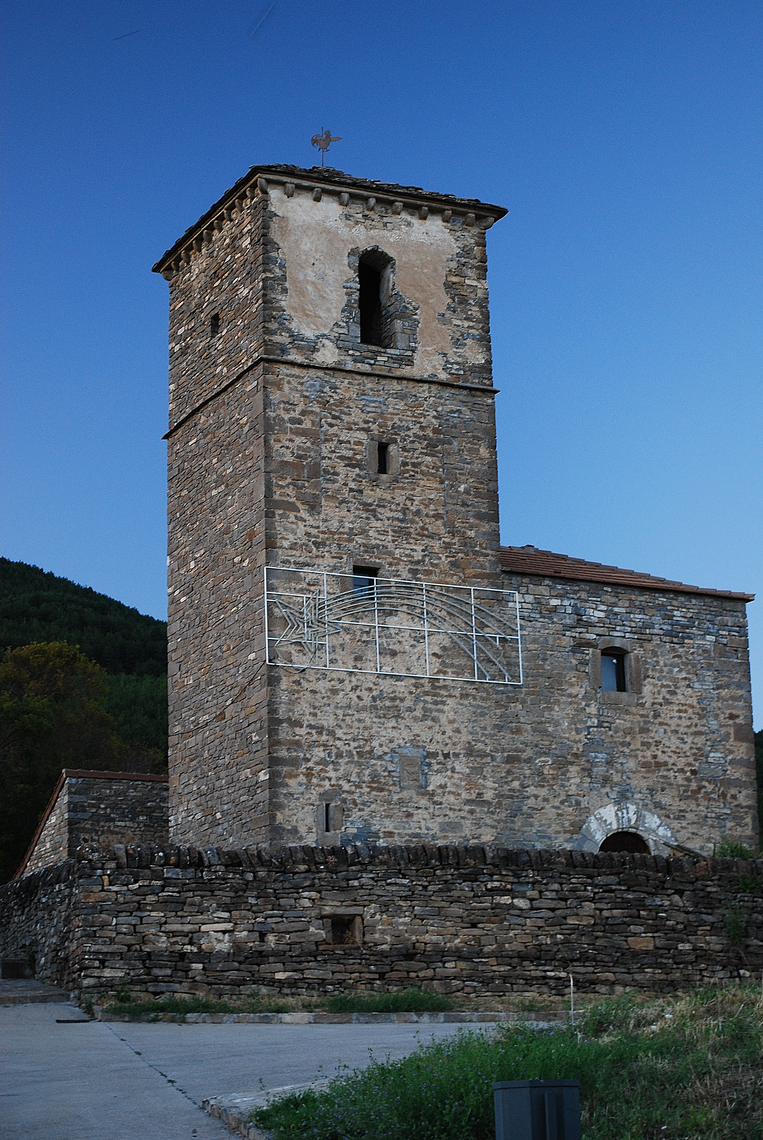 Badaguás